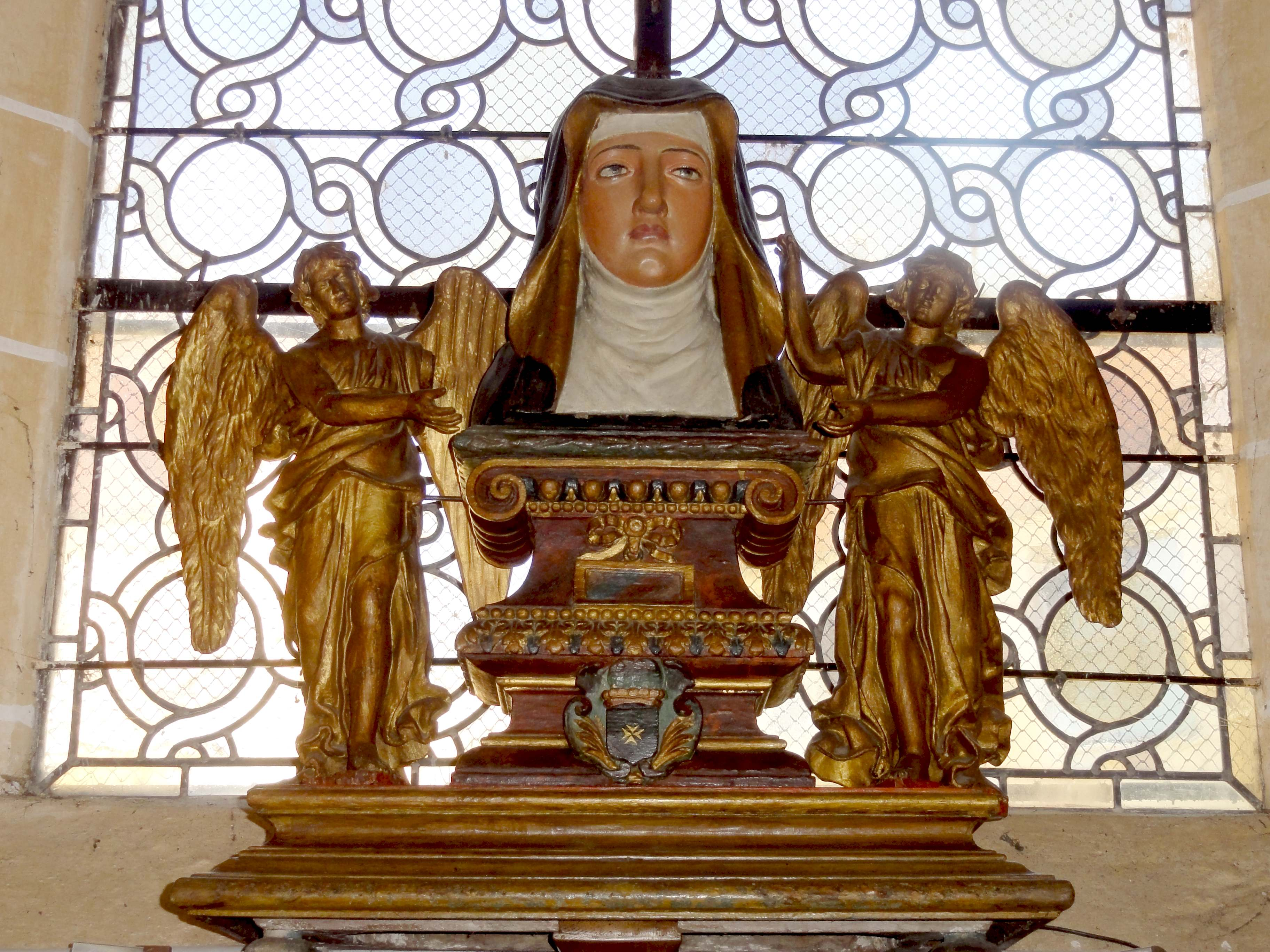 Châsse de sainte Opportune.